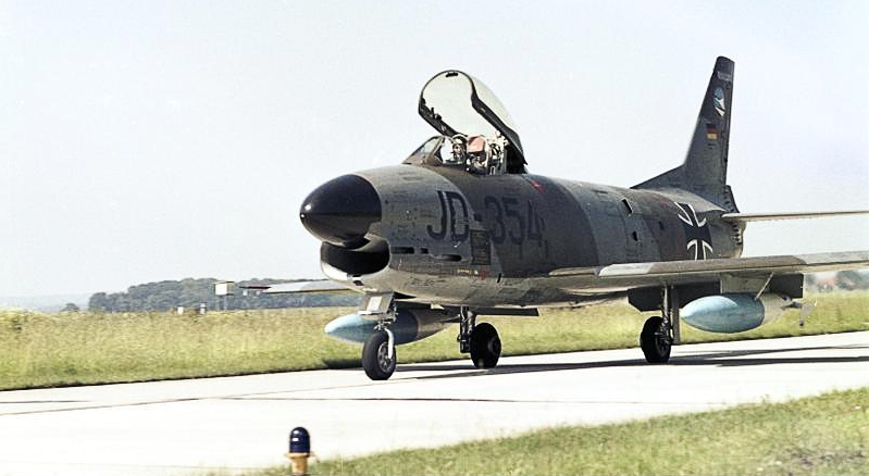 Kampfflugzeug F-86K Sabre des Jagdgeschwader 74 "Mölders" JD+354 auf Rollbahn mit geöffneter Cockpithaube